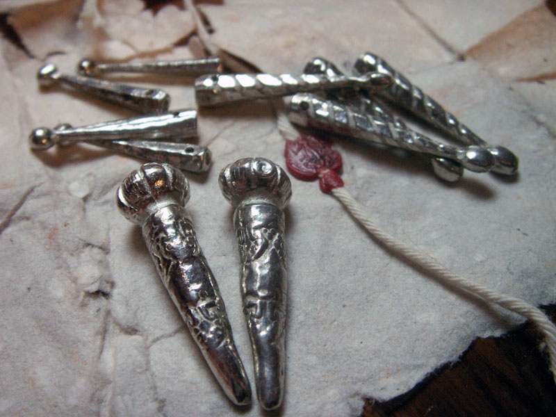 Gegossene Nestelspitzen aus Zinn als Ende für ein Nestelband